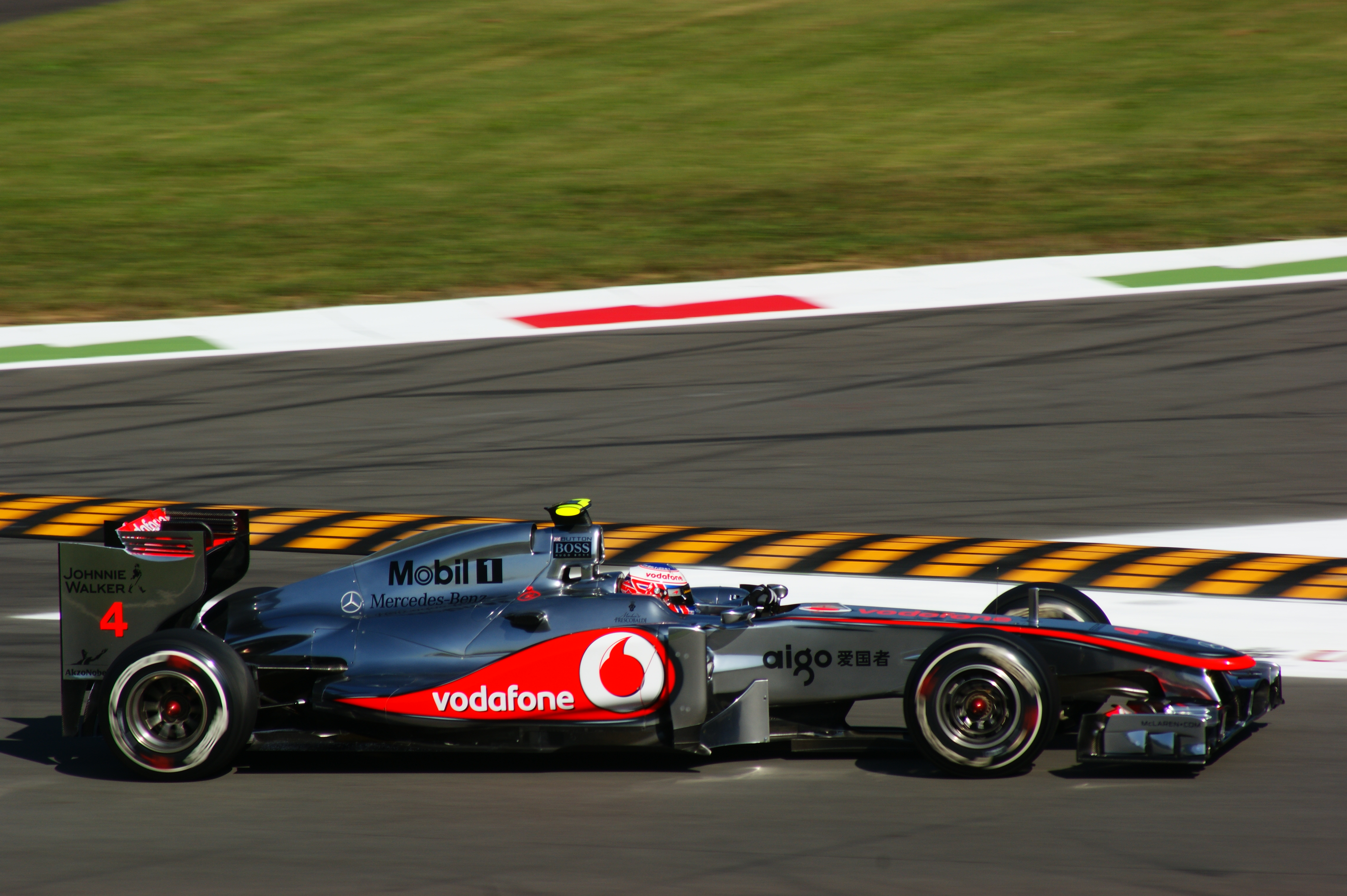 Jenson Button alla prima variante Monza 2011